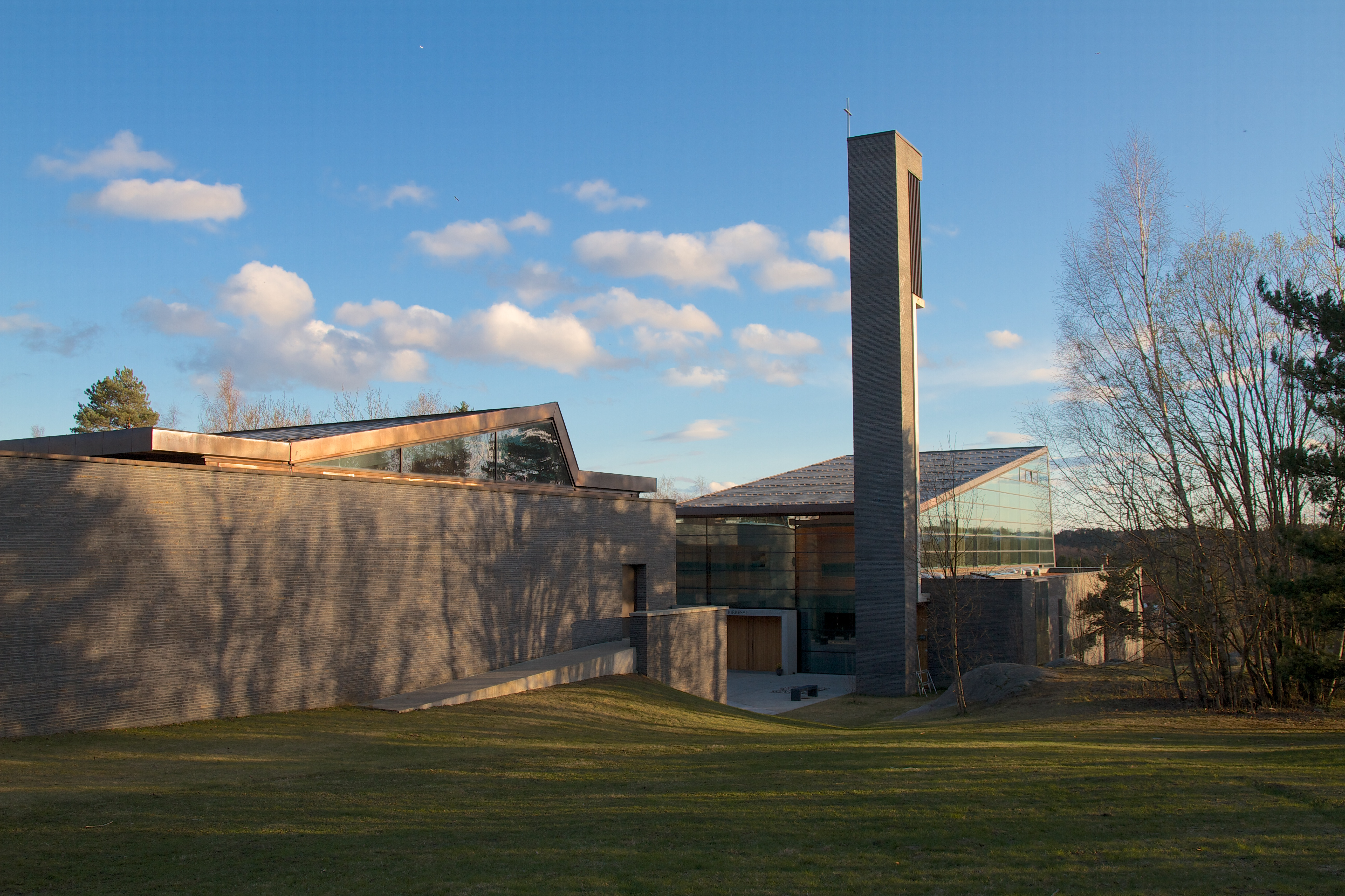 Bøler kirke på Bøler i Oslo.